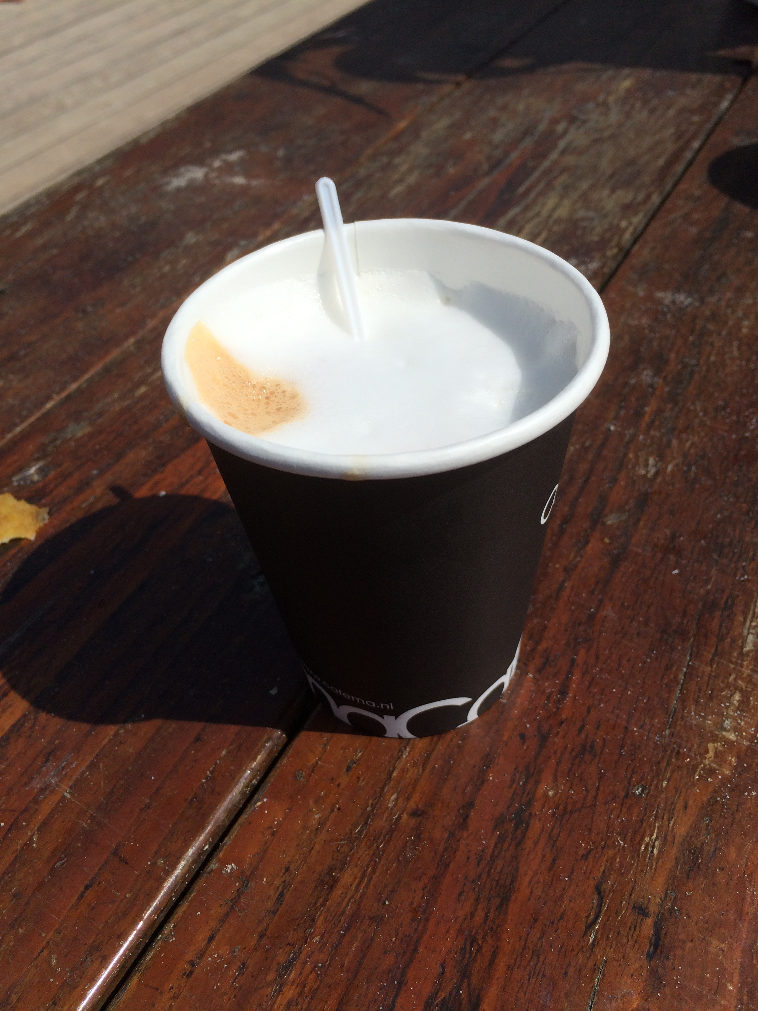 Cappuchino to go